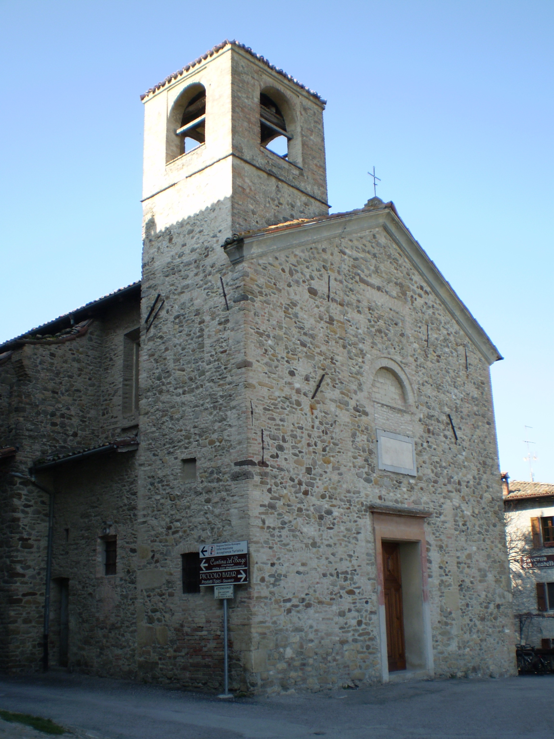 Chiesa del borgo di Torrechiara